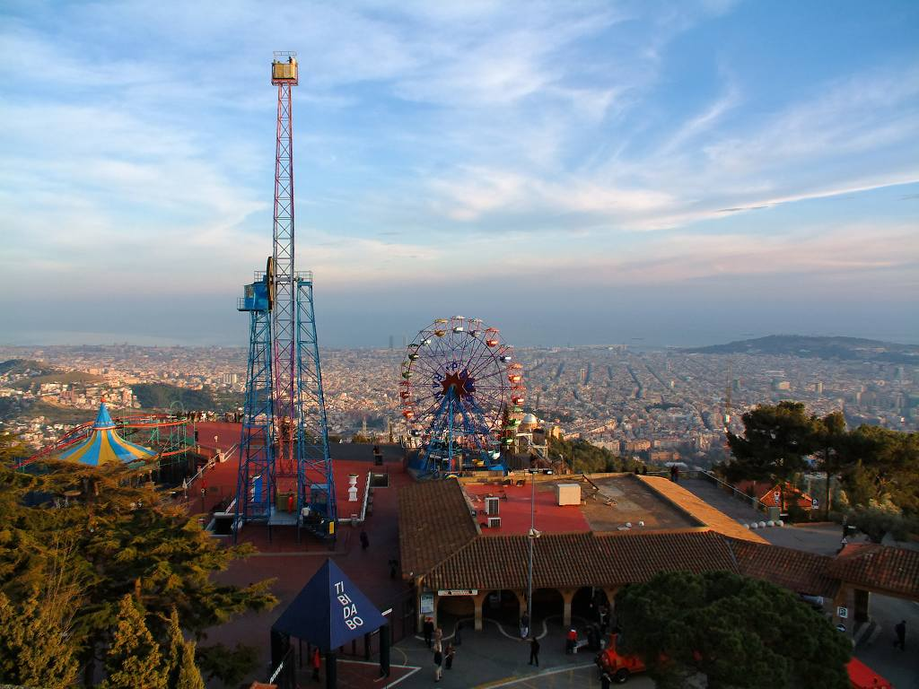 Descripción: Vistas desde el Sagrat Cor Fecha: 27/01/2003 Hora: 17:24 Cámara: FinePix 6900Z ISO: 100 Tv: 1/125 Av: 5 Autor: aTarom